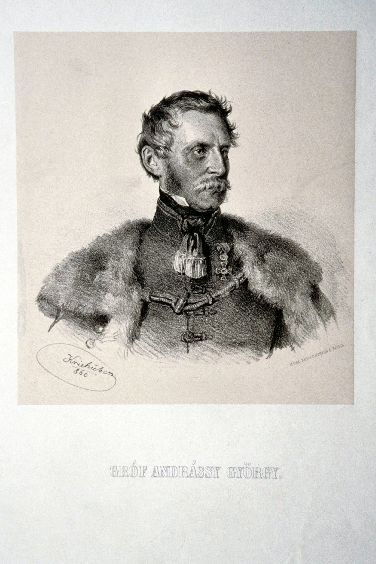 György Andrássy, Graf von Csik-Szent-Kiraly (1797-1872), Obergespan des Saroser Komitats, Mitglied der ungar. Akademie, Judex Curiae. Lithographie von Josef Kriehuber, 1860